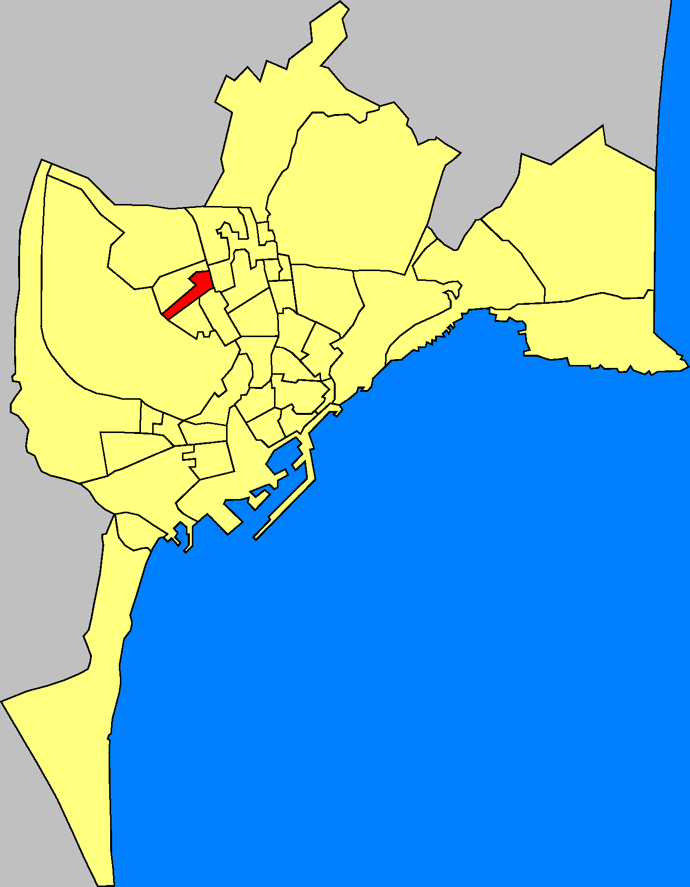 Barrio Tombola de Alicante